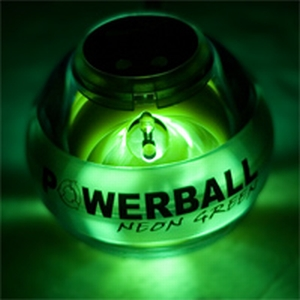 Изображение светящегося тренажёра Powerball Neon Green в работе